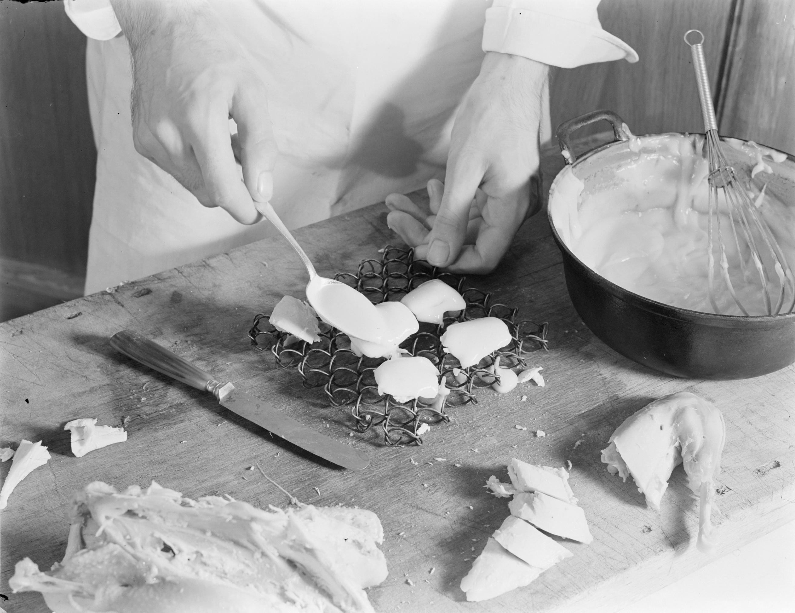 Collectie / Archief : Fotocollectie Van de Poll Reportage / Serie : Reclamefotografie Beschrijving : Chaud-froid van kip: het glaceren van stukjes kip Annotatie : Foto's gemaakt voor een kookboek van uitgeverij Veen Datum : 1936 Trefwoorden : kippen, koks Fotograaf : Poll, Willem van de Auteursrechthebbende : Nationaal Archief Materiaalsoort : Negatief (zwart/wit) Nummer archiefinventaris : bekijk toegang 2.24.14.02 Bestanddeelnummer : 252-1843